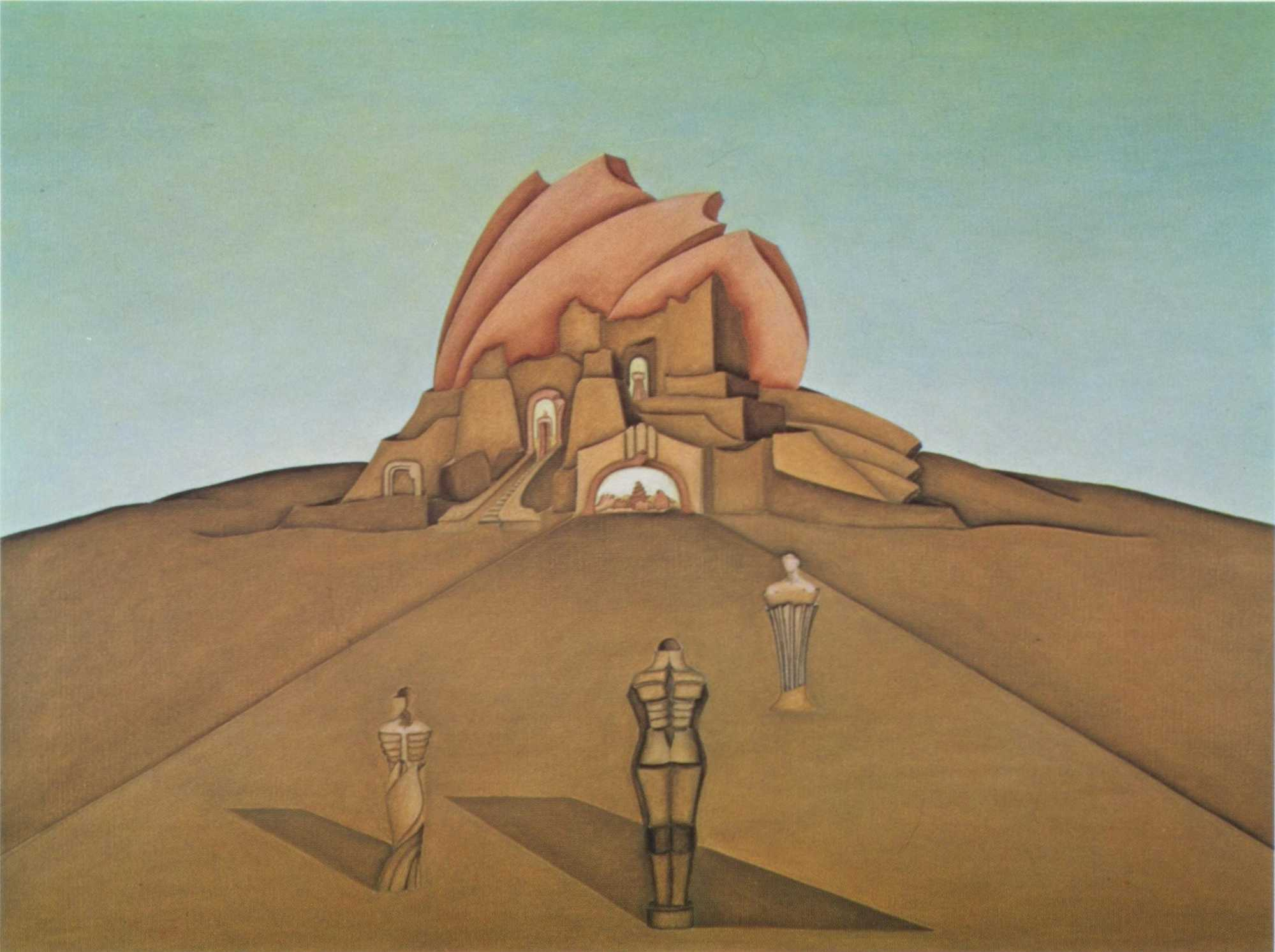 Babylon von Ursula Stock, Öl auf Leinwand, 90 x 120 cm, 1978.